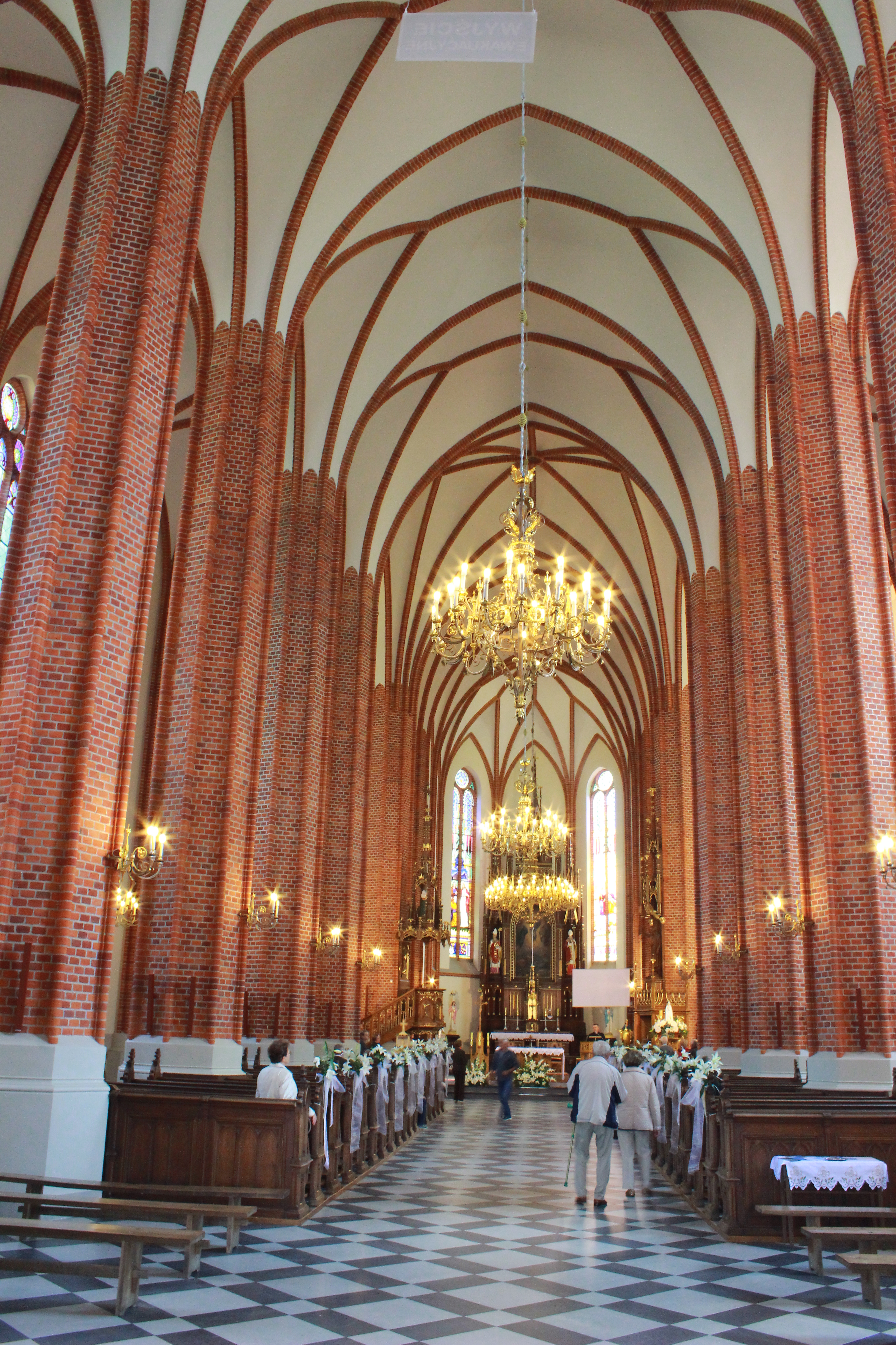 Garbów koścół Przemienienia Pańskiego_1